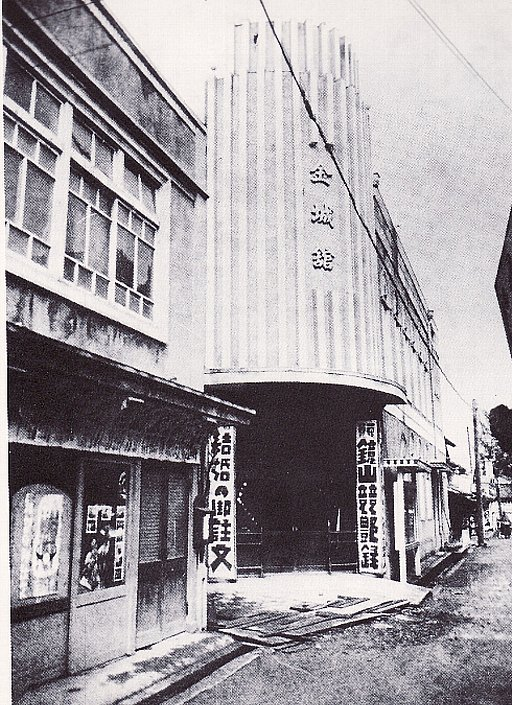 滋賀県犬上郡彦根町（現在の彦根市）の金城館（のちの彦根映画劇場）、1933年の写真。